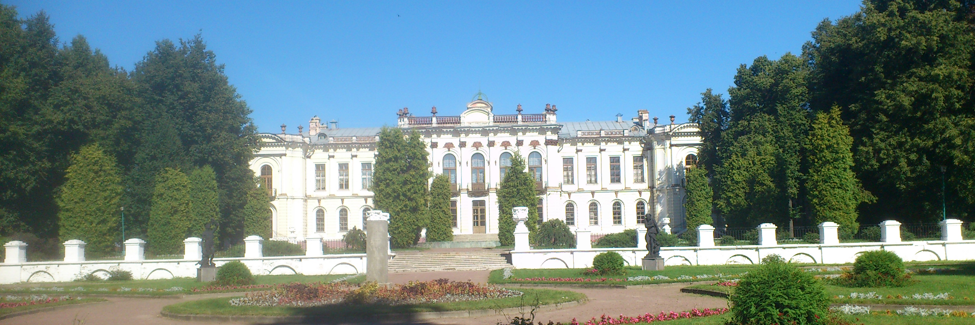 Вид на корпус № 10 Московской сельскохозяйственной академии имени К. А. Тимирязева со стороны исторического парка.